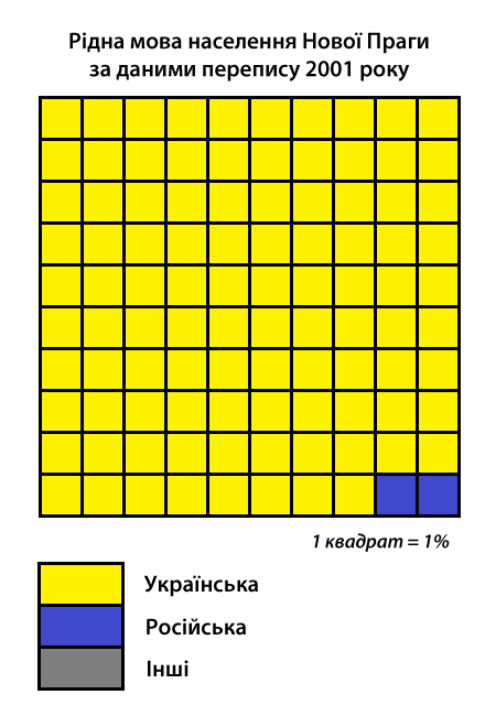 Інфографіка розподілу населення смт Нова Прага Олександрійського району за рідною мовою згідно з даними перепису 2001 року. Джерело: Розподіл населення Кіровоградської області за рідною мовою (у % до загальної чисельності населення) за переписом 2001 року